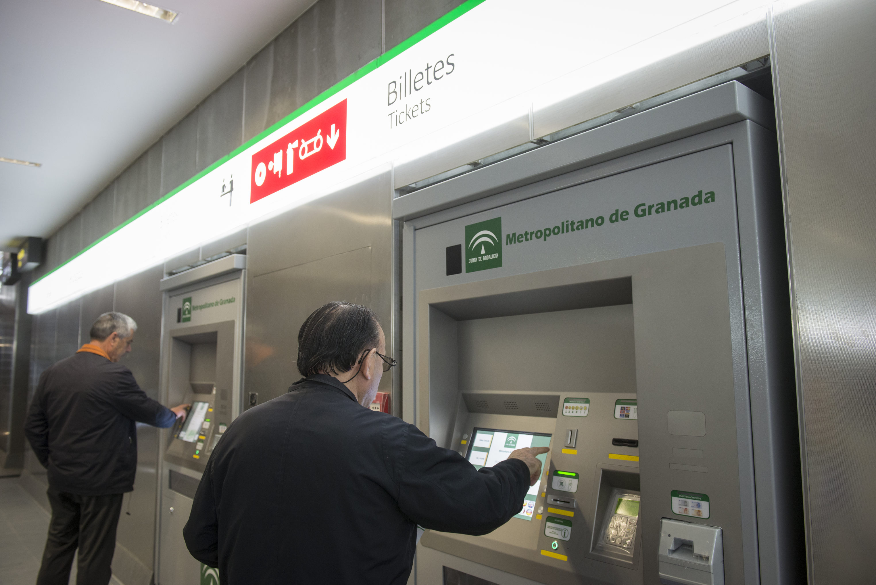 Estación de Recogidas